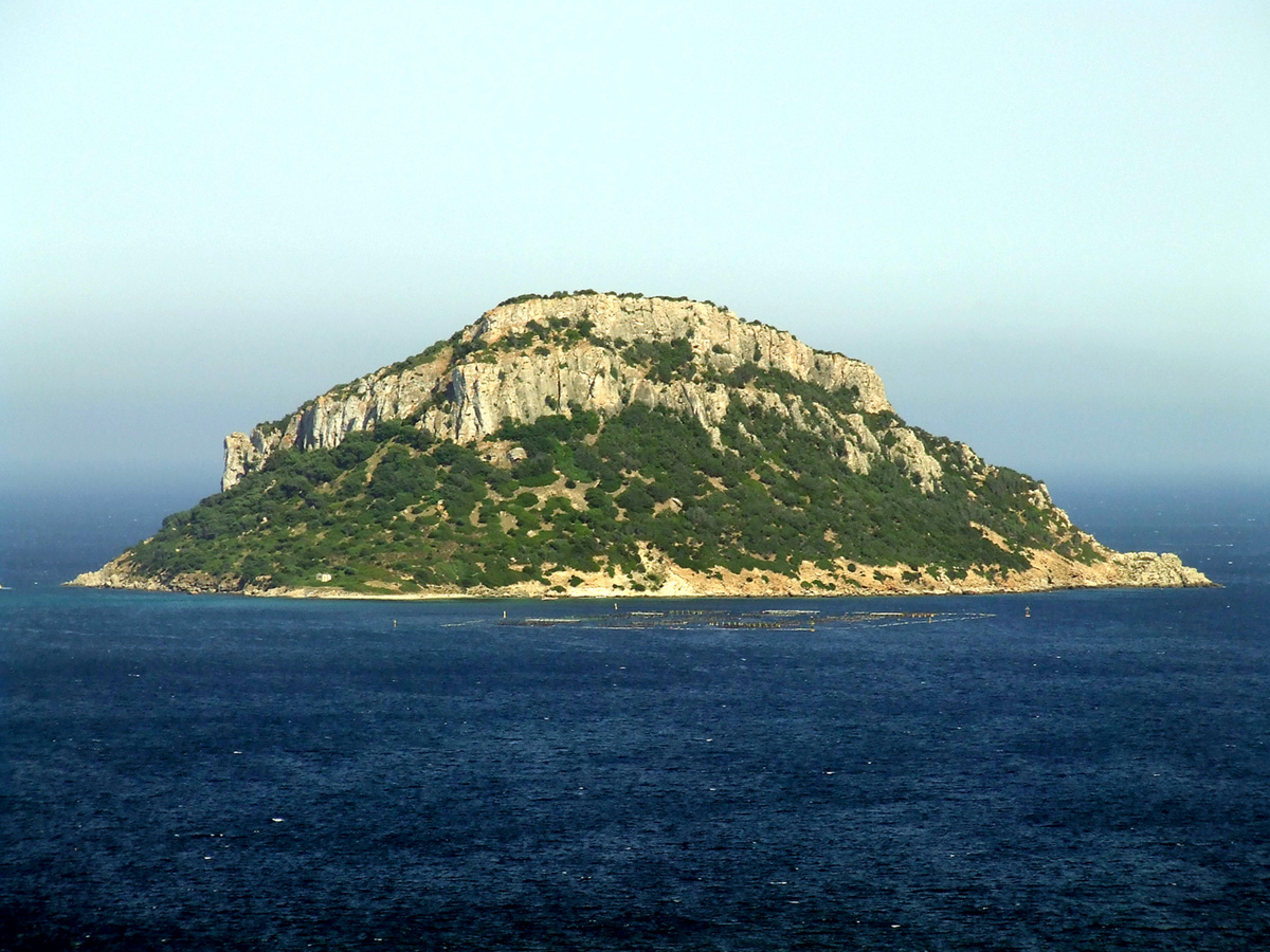 Île de Figarolo